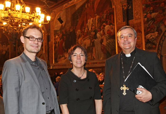 Die drei Hauptreferenten des XII. Marburger Ökumenegesprächs vom 23. Januar 2010 in der Alten Aula der Philipps-Universität in Marburg, Deutschland (von links): Matthias Drobinski (Süddeutsche Zeitung), Margot Käßmann (Landesbischöfin, EKD-Ratsvorsitzende), Karl-Heinz Wiesemann (Bischof von Speyer). (Fotograf: Rolf K. Wegst)